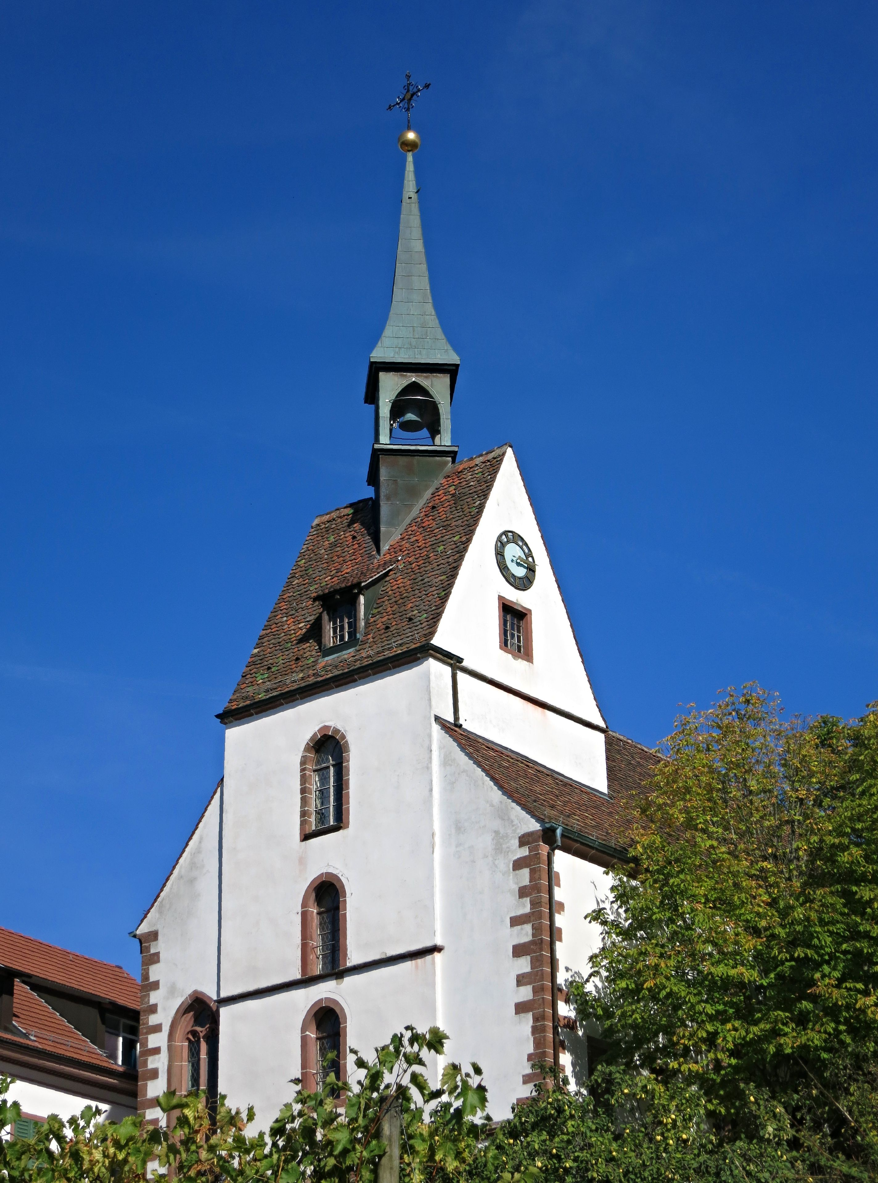 Kirche St. Chrischona